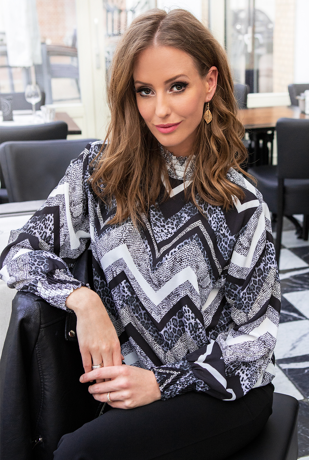 Sabrina van der Donk